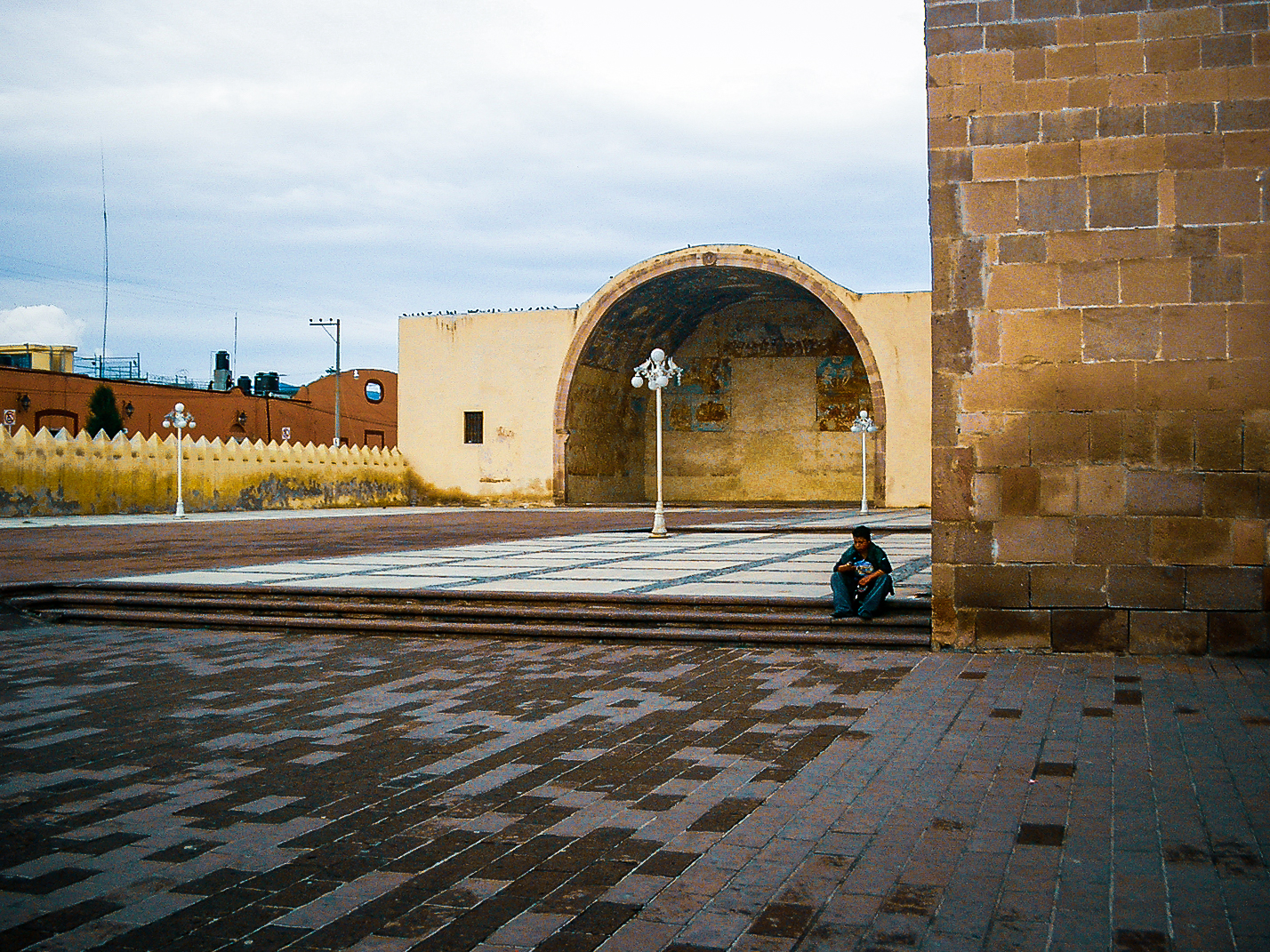 Capilla abierta y atrio de Actopan, Hidalgo.